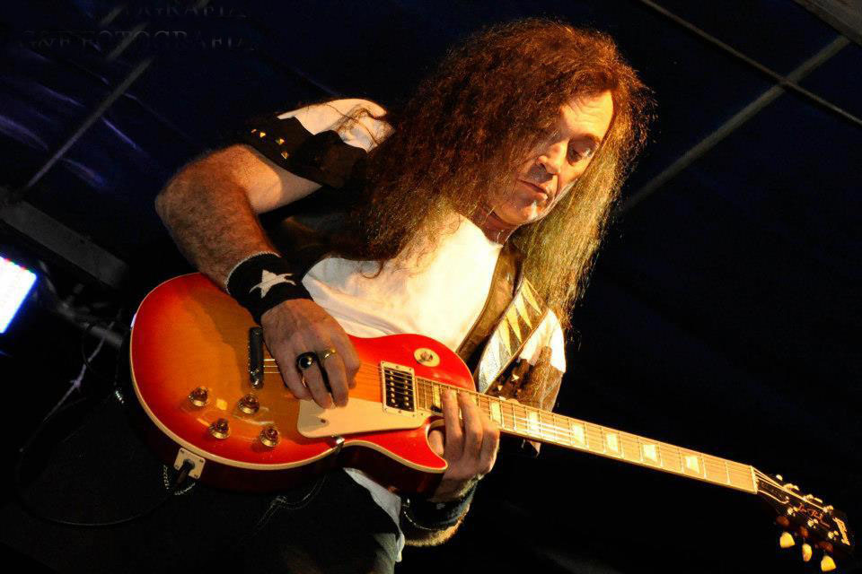 GADY PAMPILLÒN